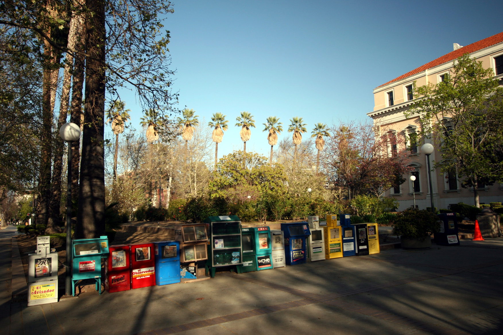 San Jose, CA